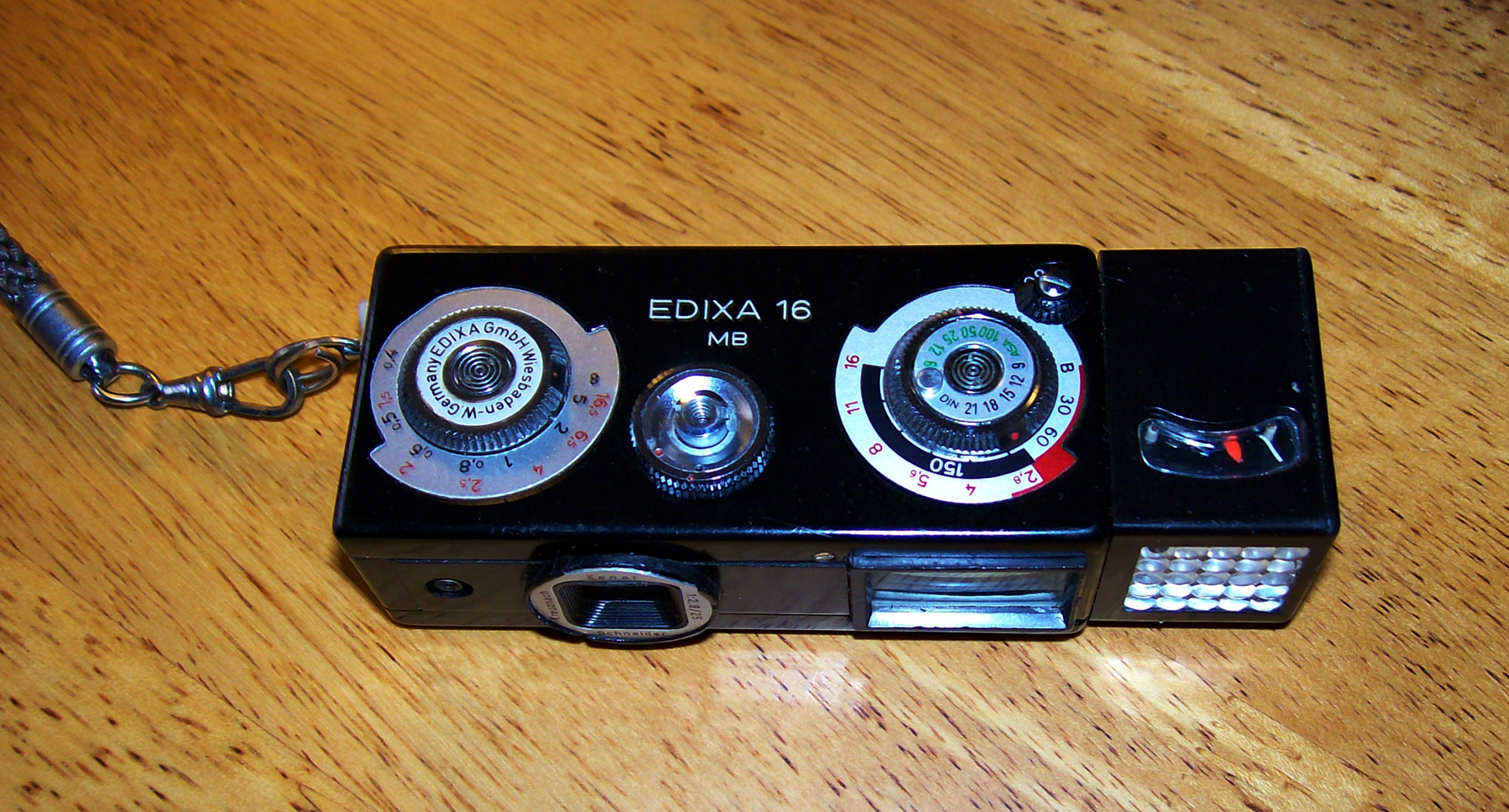 Edixa 16MB， 16mm subminature camera